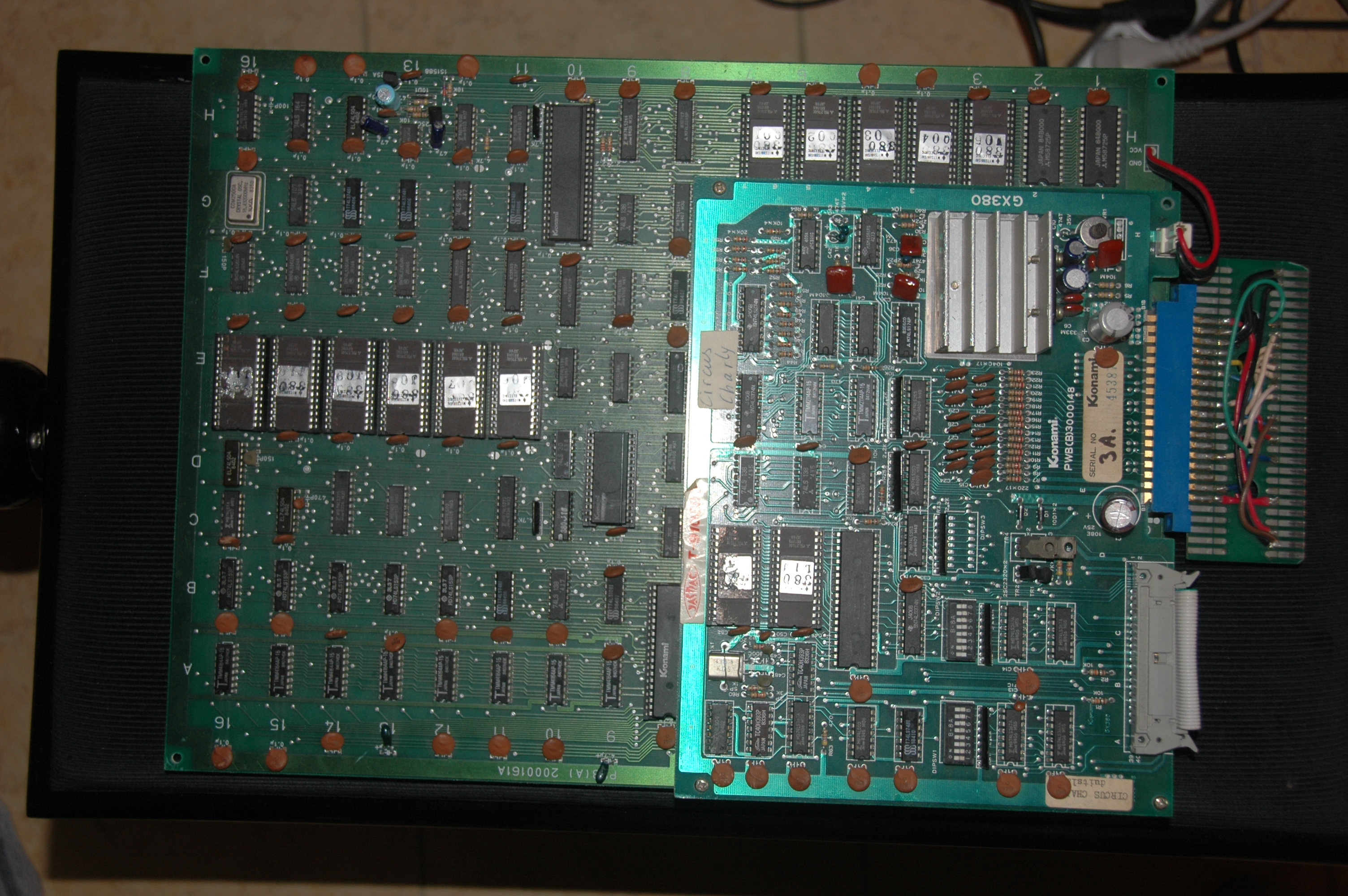 La mortherboard di Circus Charlie originale Konami